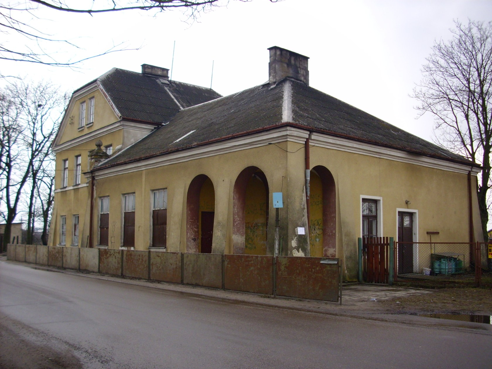 Budynek stacji kolejowej w Krzywdzie (linia kolejowa nr 26 Łuków - Dęblin). Widok od strony ulicy.